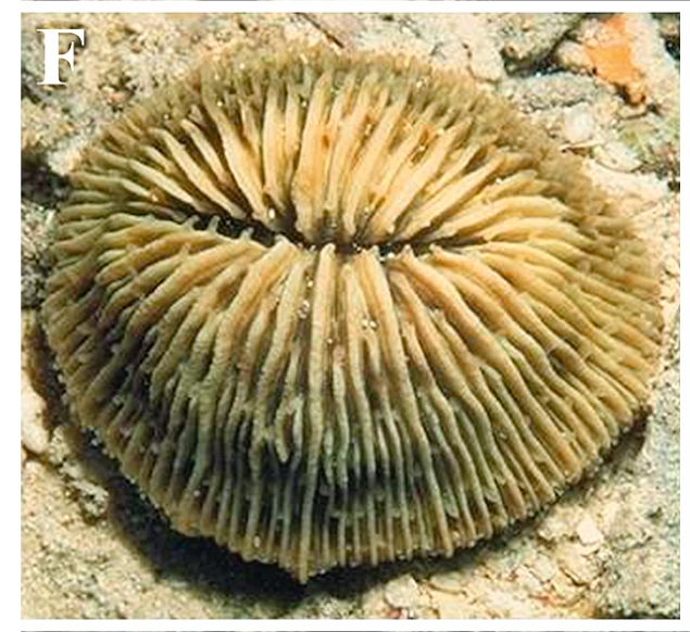 Cycloseris cyclolites en Filipinas